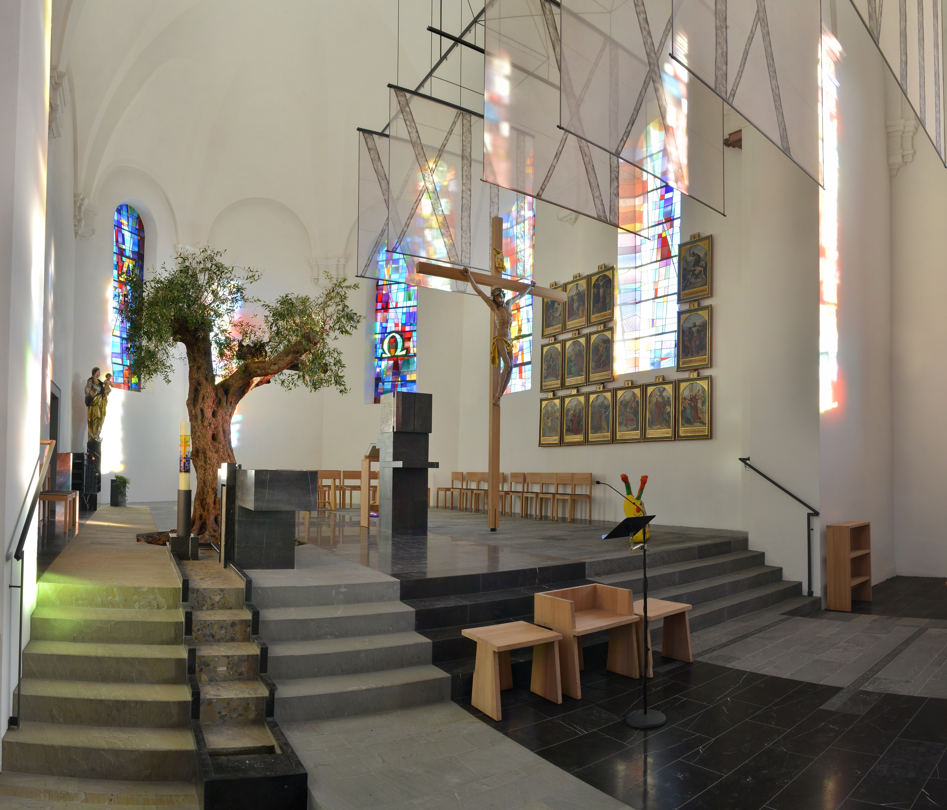 Pfarrkirche hl. Johannes d.T. nach dem Umbau 2010 in Lingenau im Bregenzerwald.